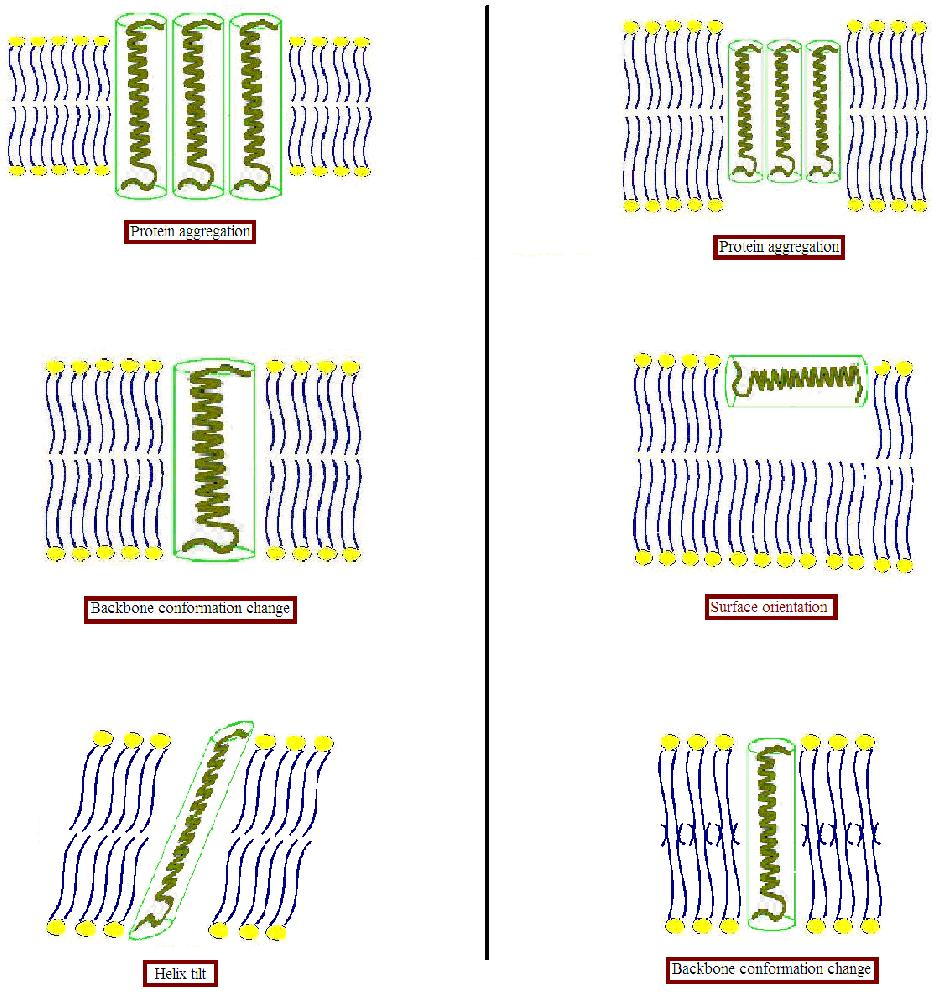 hydrophobic mismatch